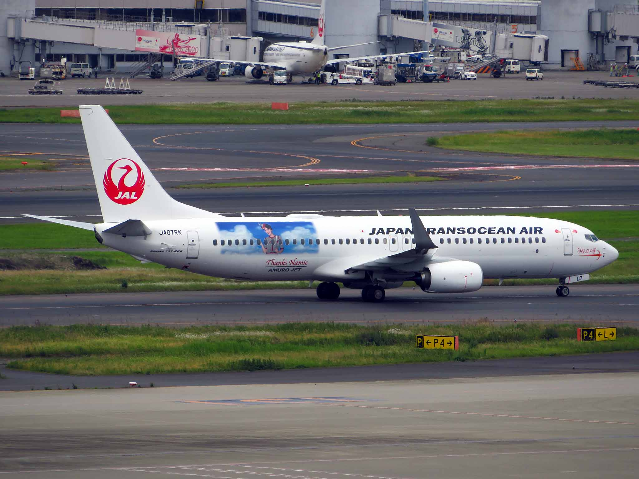 安室奈美恵の芸能デビュー25周年と2018年の引退を記念して同年に登場したAMURO JET。日本トランスオーシャン航空のボーイング737・JA07RKに施され、2018年5月から9月まで運行された。現在は標準塗装に戻されている。 Canon PowerShot SX720 HS